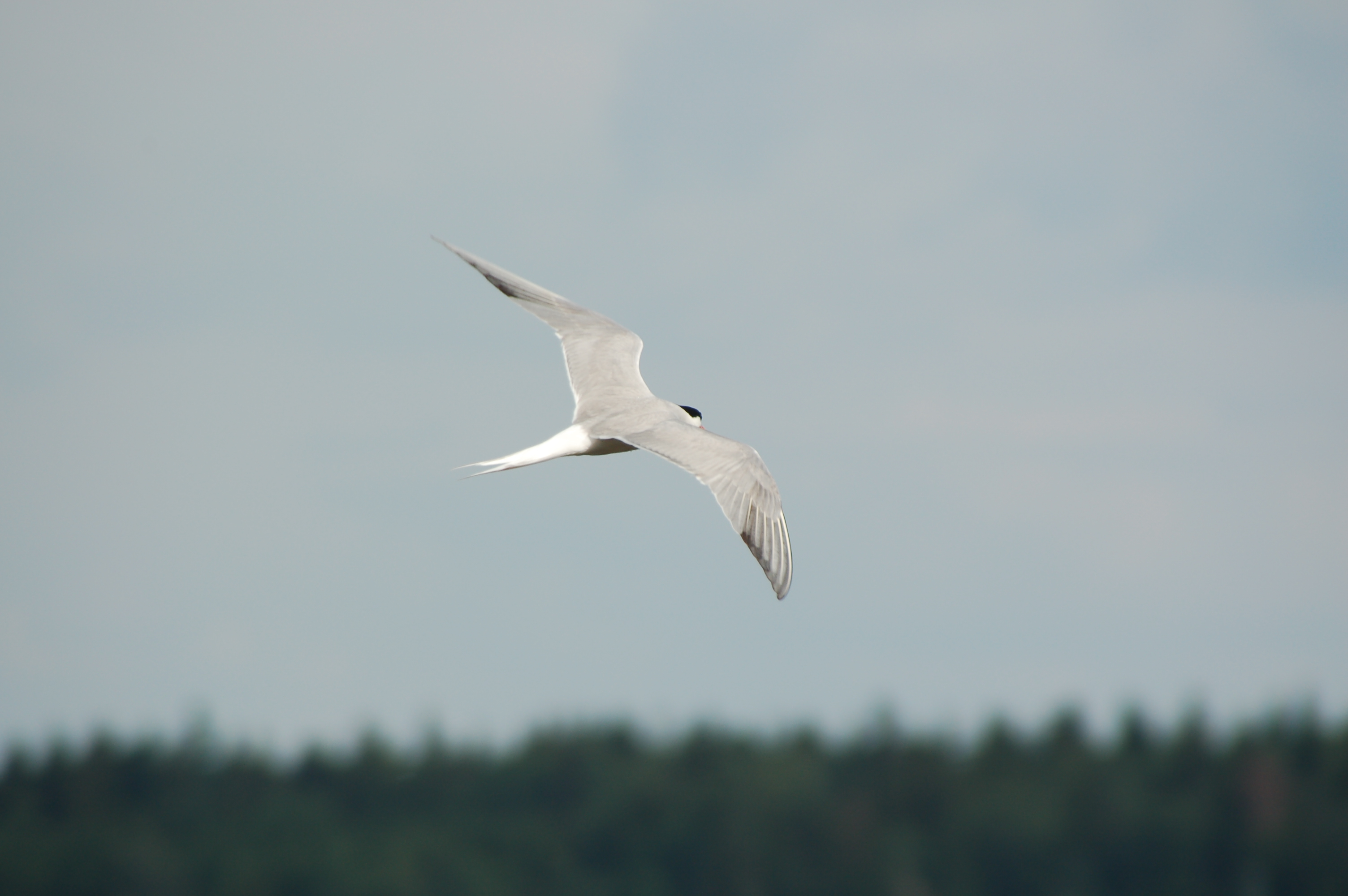 Sterna hirundo/ Common Tern/ Flussseeschwalbe